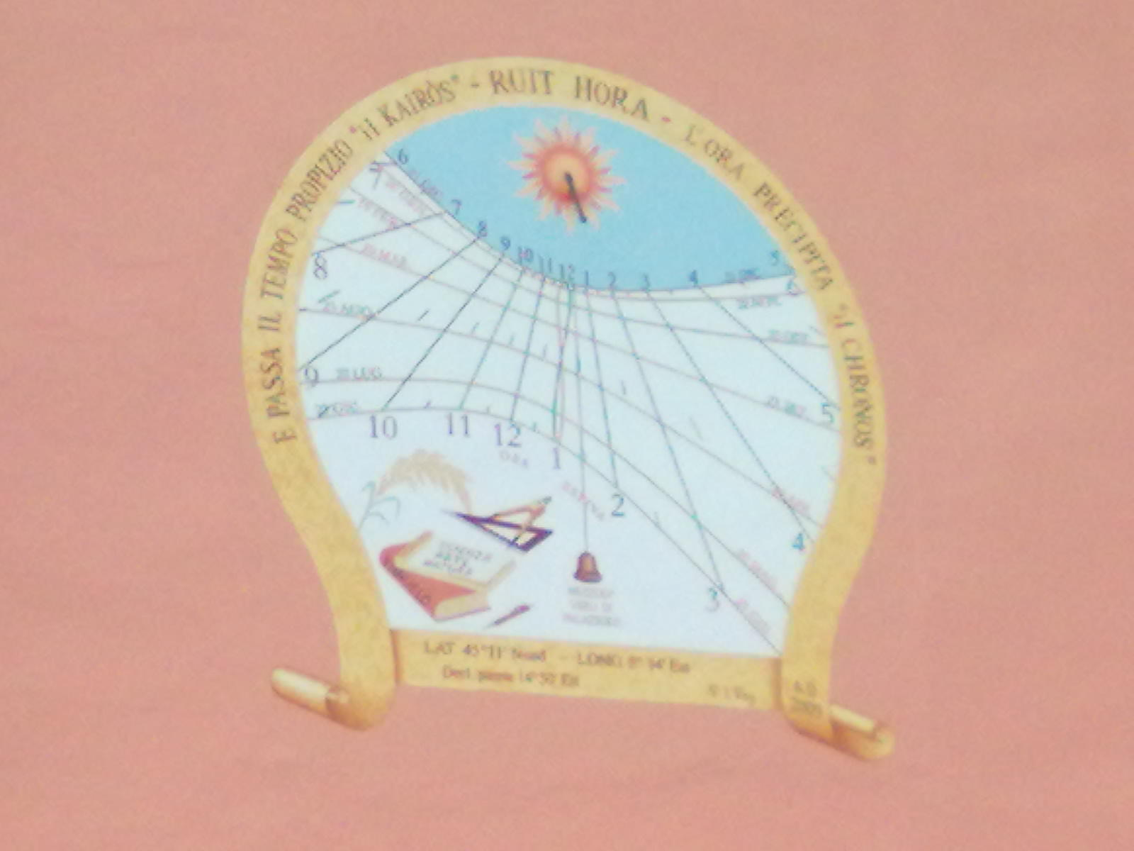 La meridiana sulla parete sud della chiesa della Madonnina a Palazzolo Vercellese